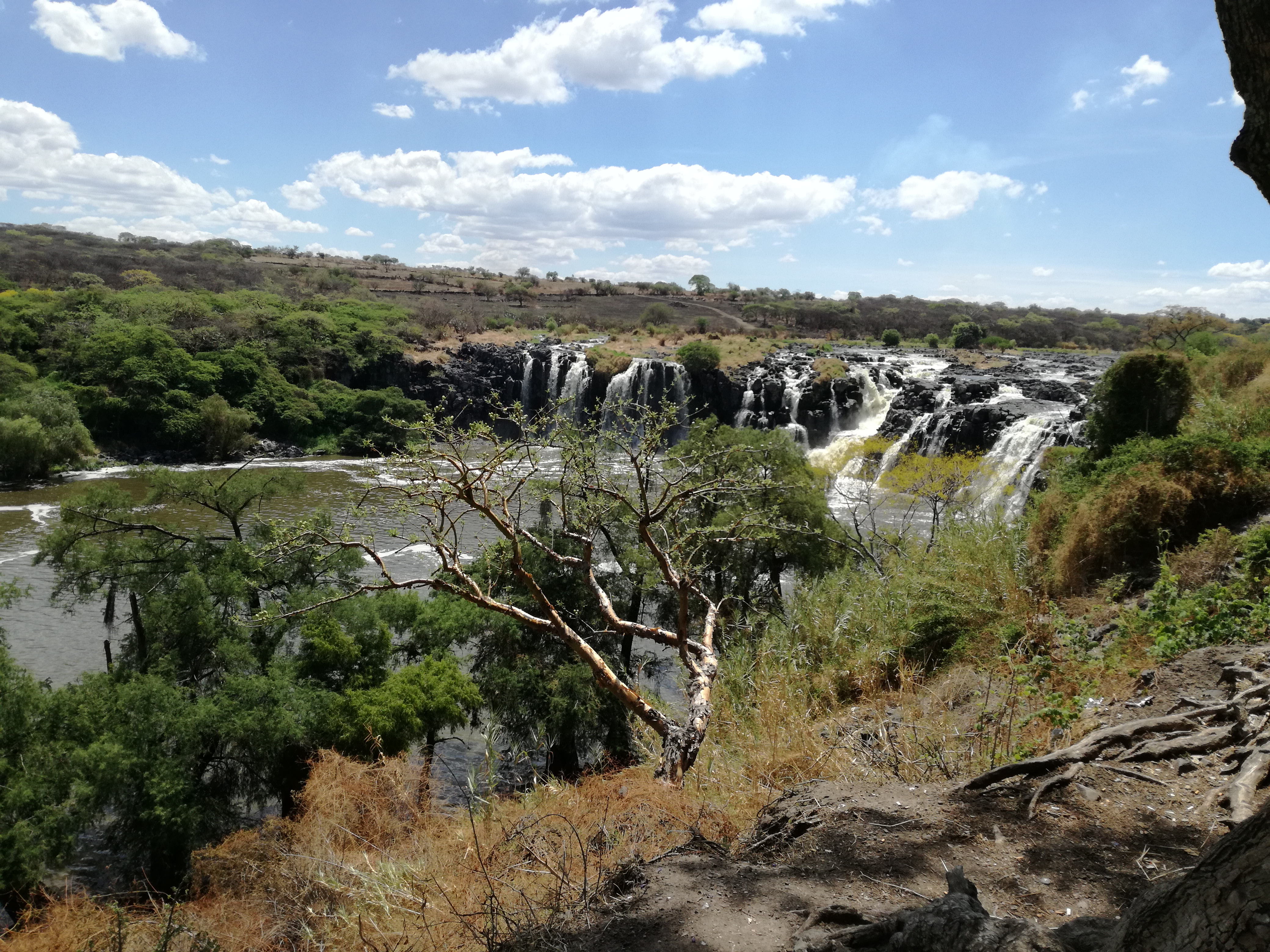 Cascada "El Salto" en La Piedad, Michoacán